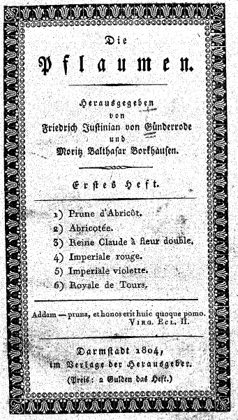 Titelblatt der Pflaumenmonographie Die Pflaumen von F.J. Günderrode